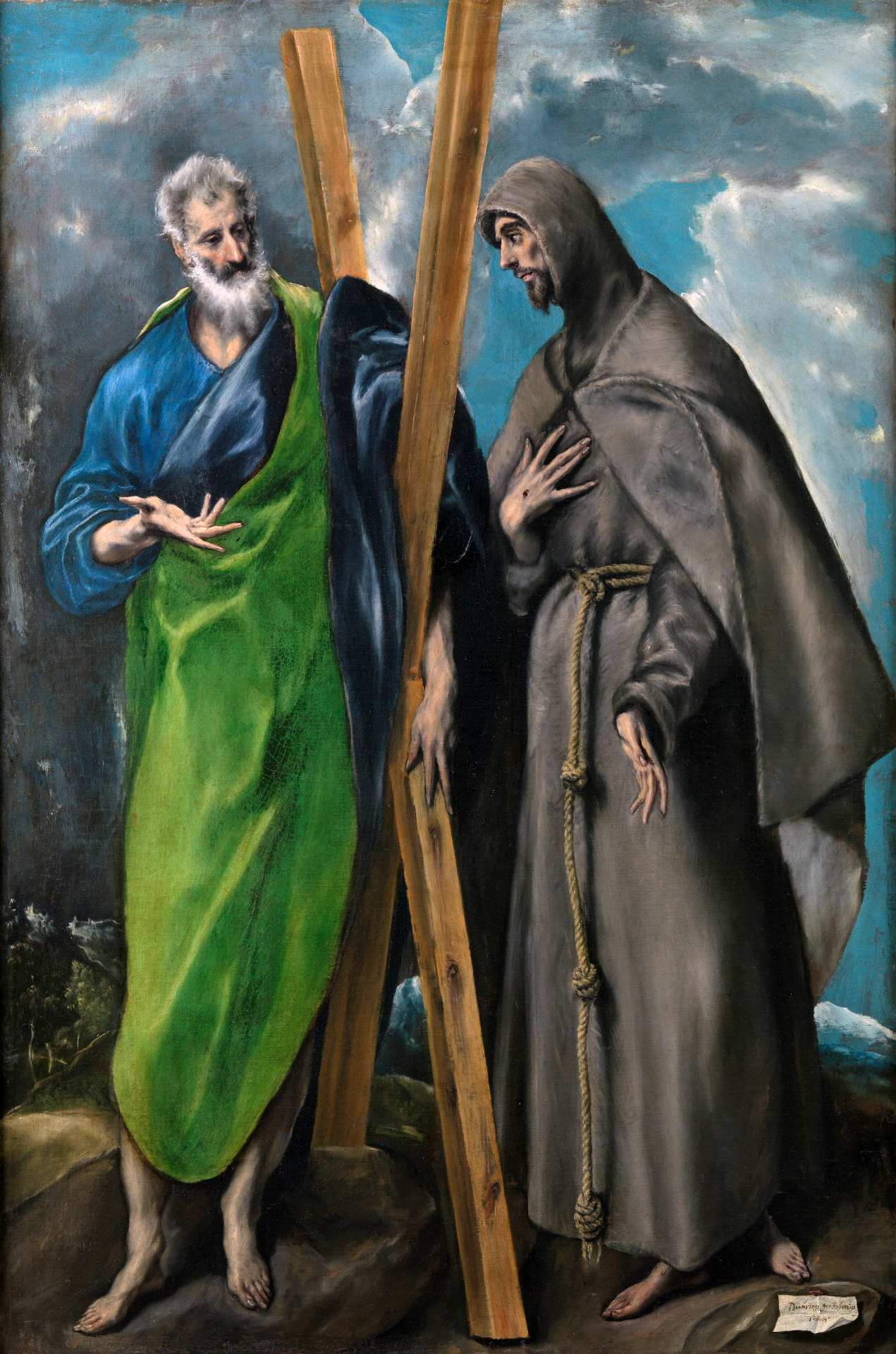 La obra representa al apóstol San Andrés, que era hermano del apóstol San Pedro, junto a San Francisco de Asís, fundador de la Orden de los franciscanos.